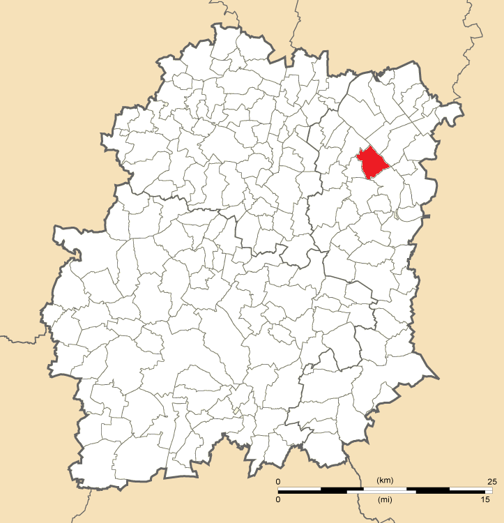 Carte de position d'Évry en Essonne